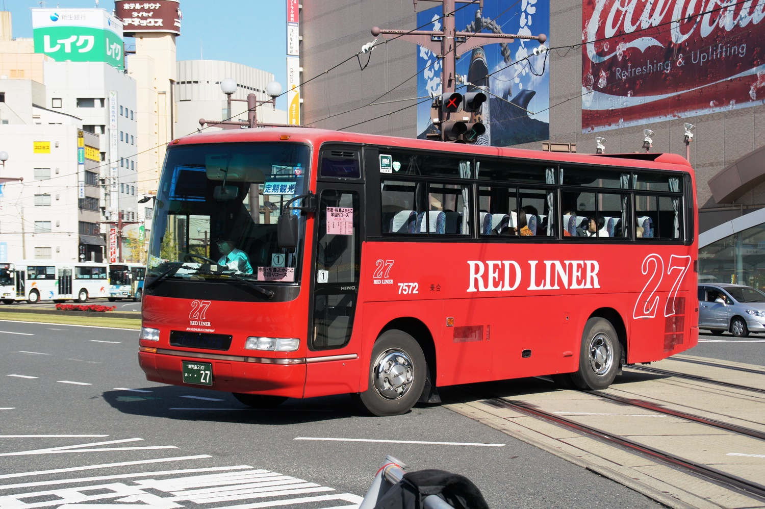 定期観光バス